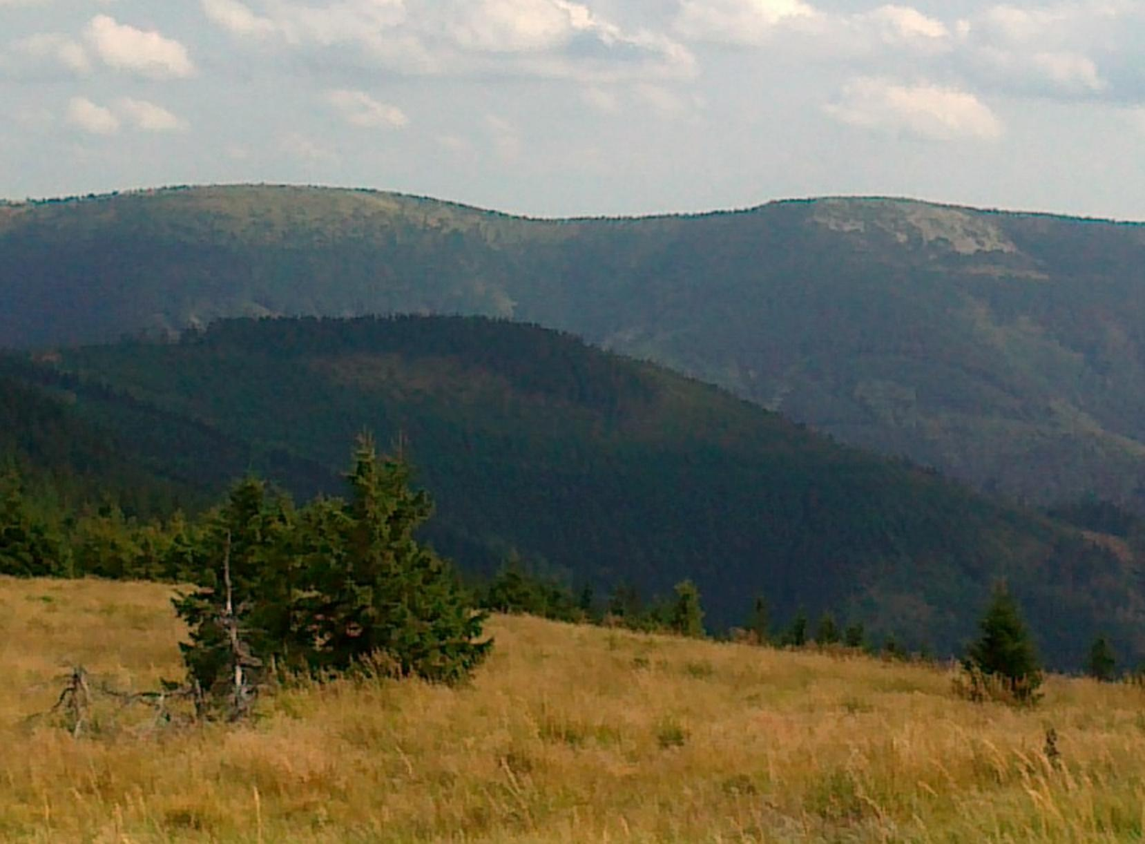 Jelení hřbet, Břidličná hora (poniżej Homole) widziane ze stoku góry Mravenečník